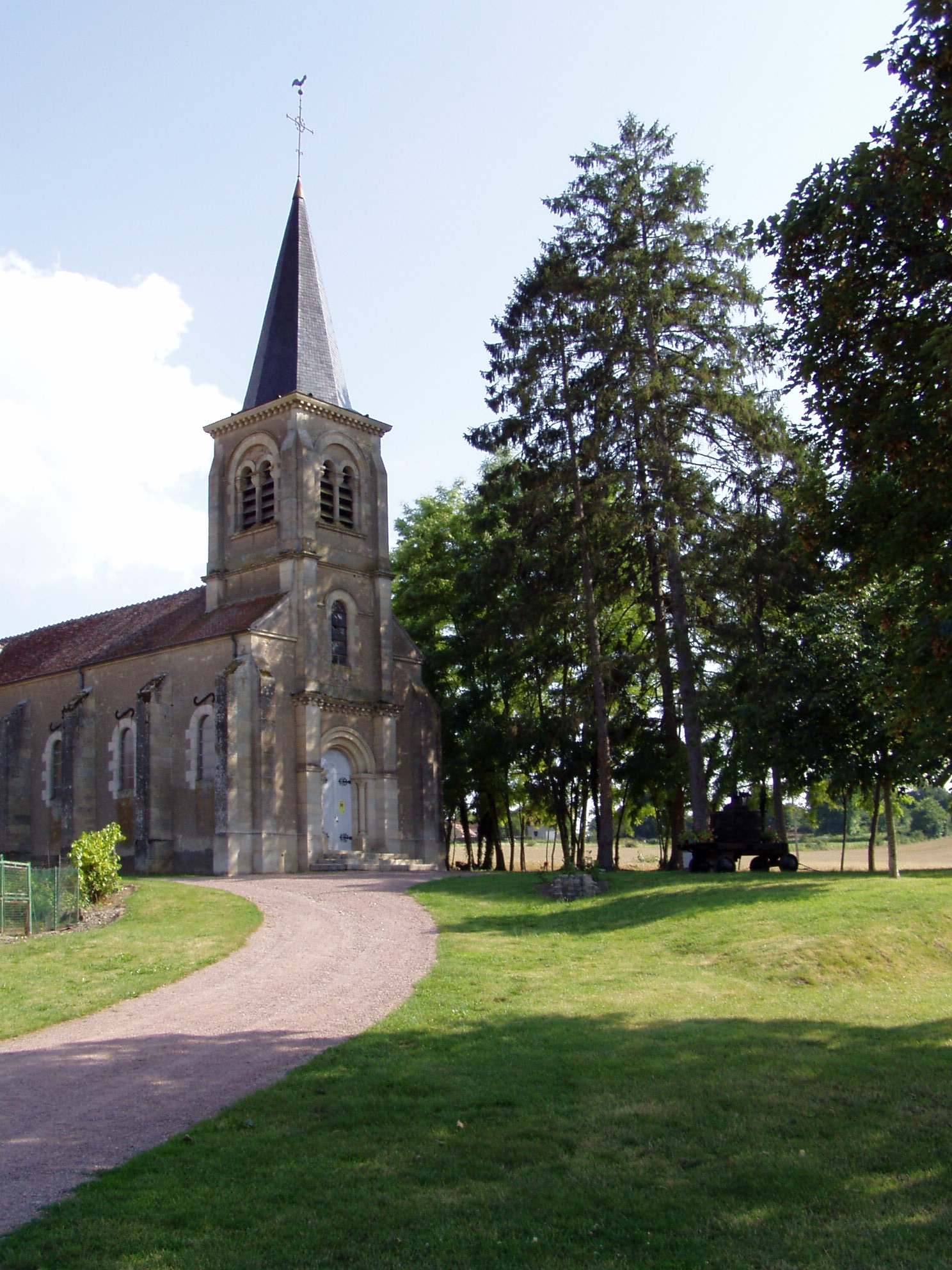 Eglise de Chasnay (Nièvre).